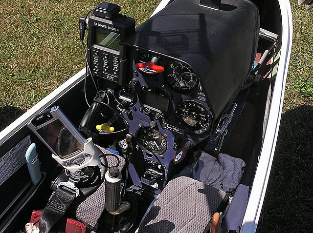 Kabina jedrilice